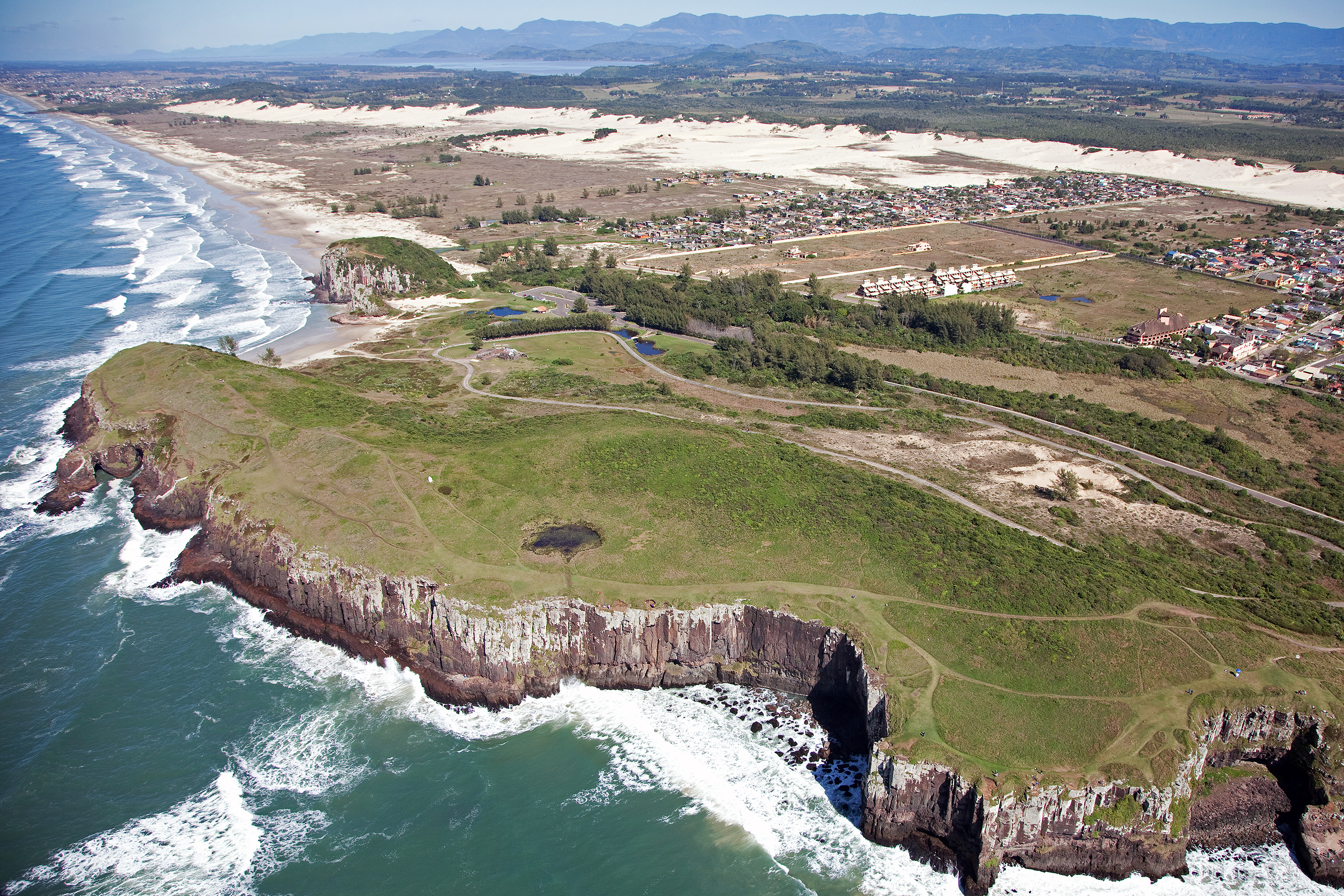 Foto aérea do Parque da Guarita em Torres-RS, Brasil.